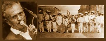 Brìgido Santamarìa, a quien se le atribuye la connotación de los sones del Chinelo.